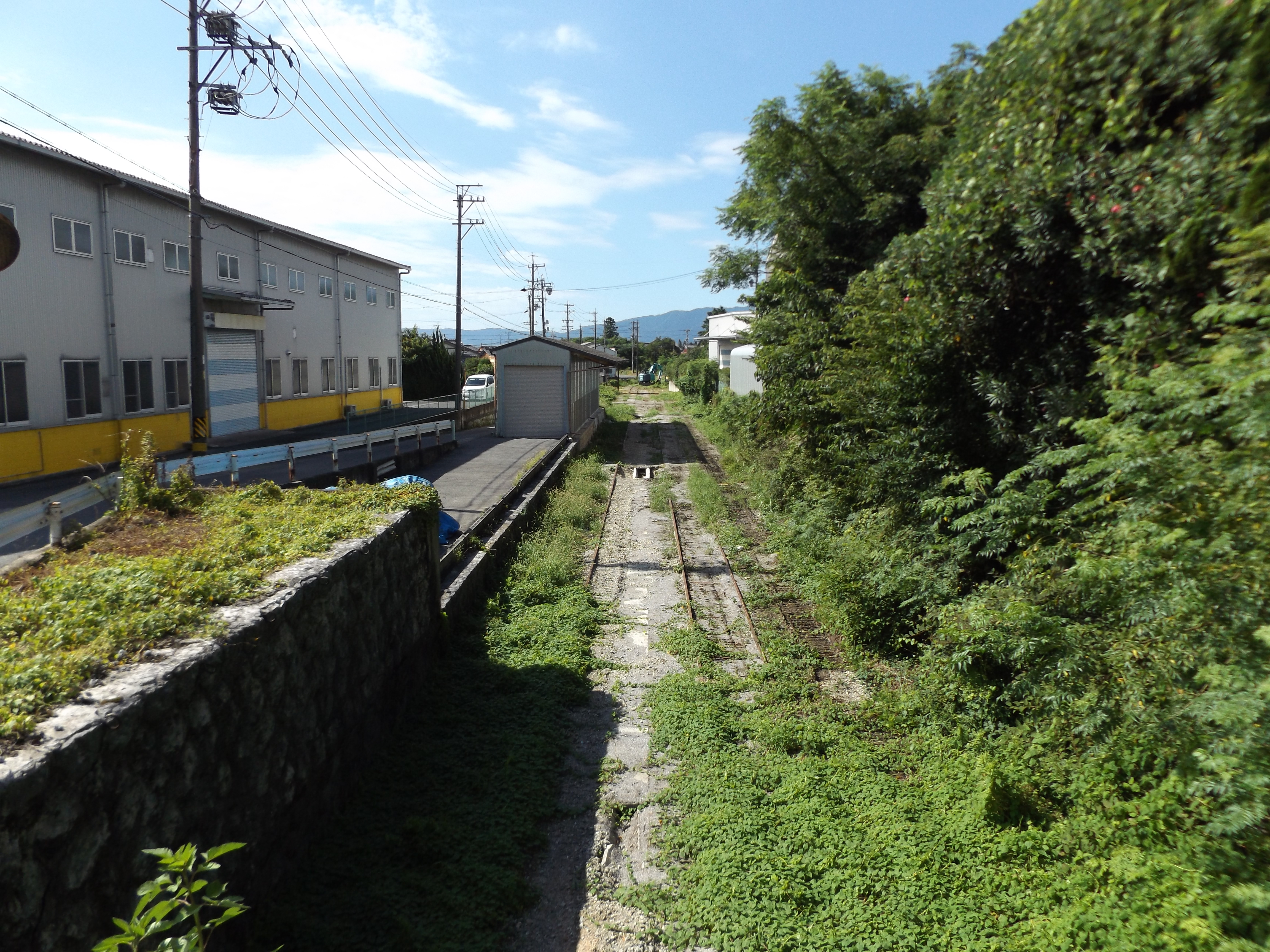 西濃鉄道昼飯線美濃大久保駅跡（終端部から構内を見る）。